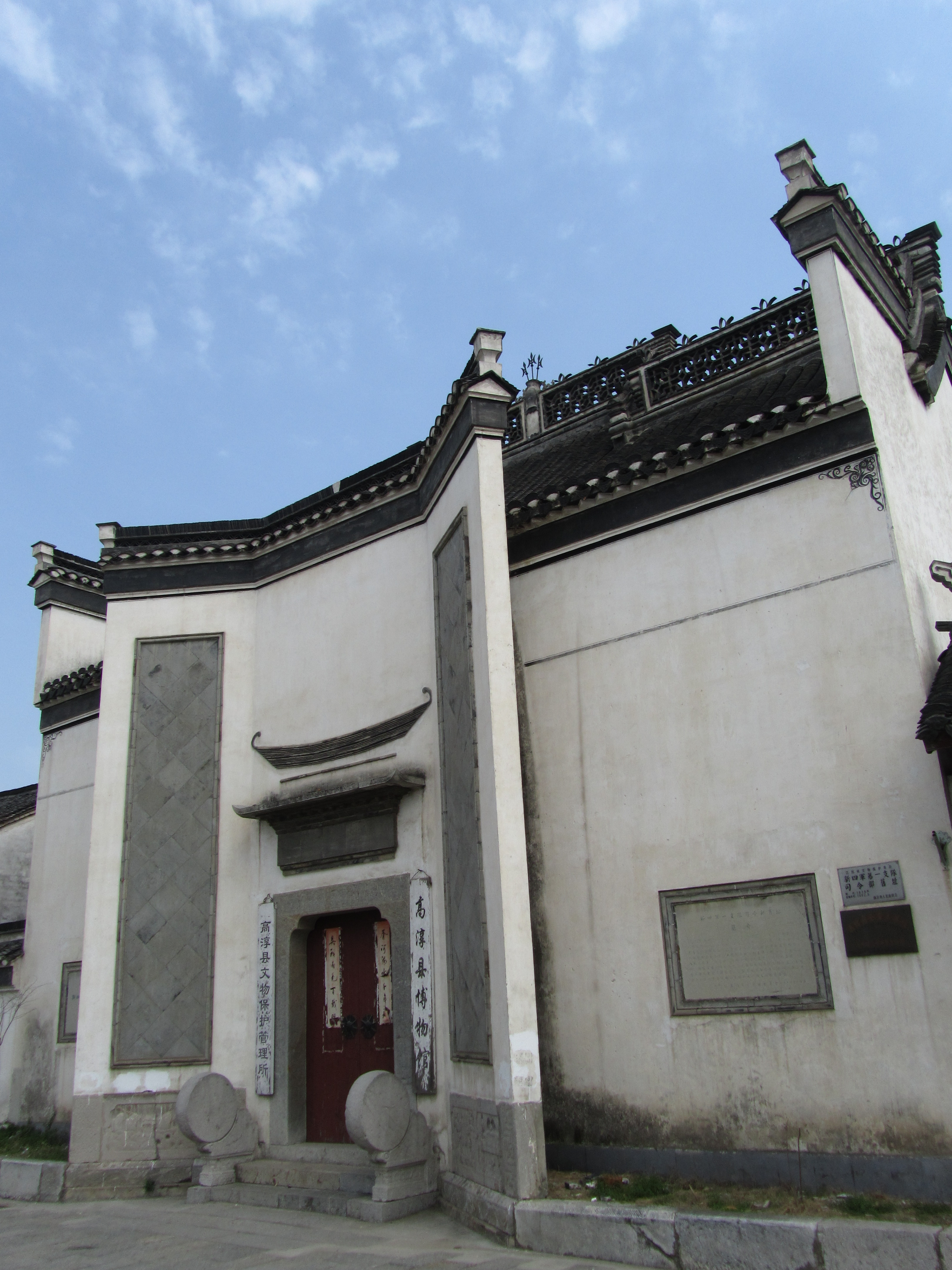 南京高淳吴氏宗祠，新四军一支队司令部旧址。